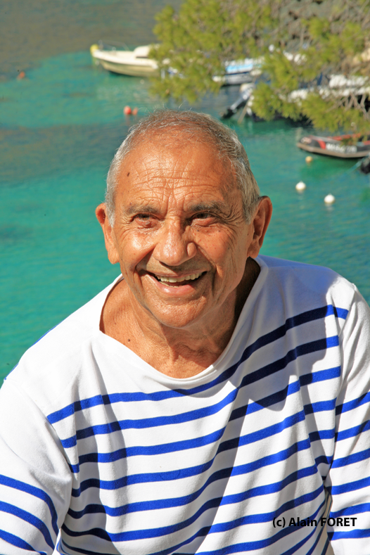 Albert Falco dans la calanque de Sormiou en 2011.